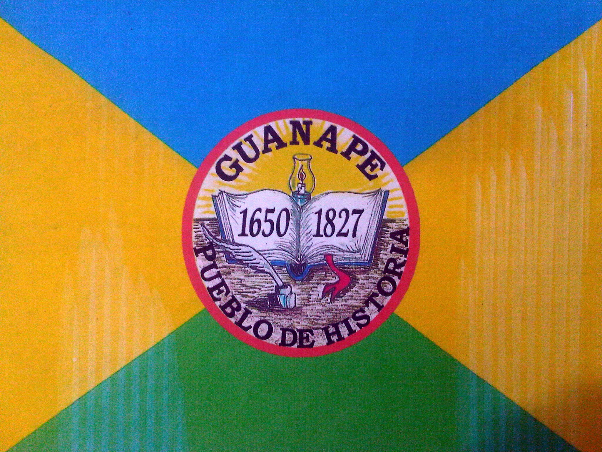 Bandera de Guanape